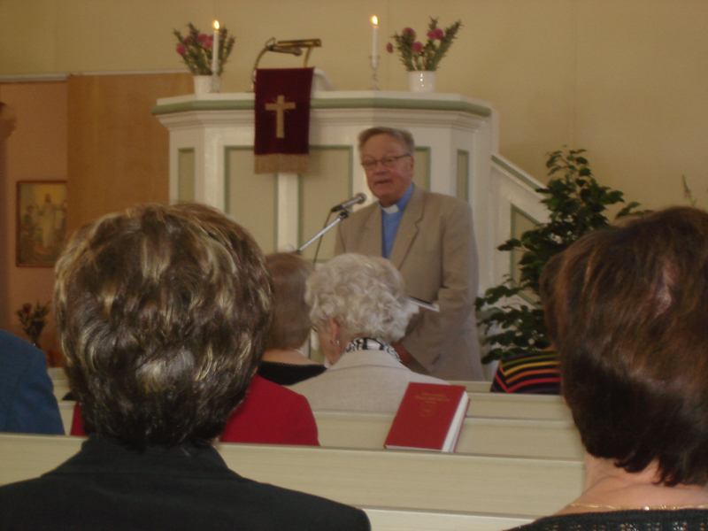 Rolf Strandman, präst i Ragvaldsträsk.